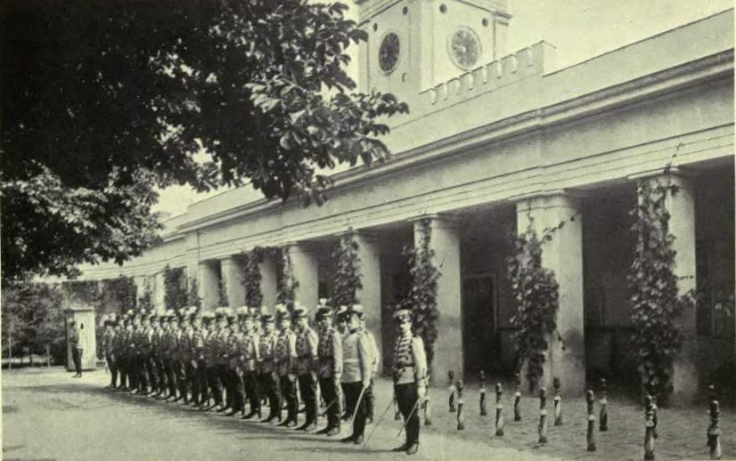 Los asesinos de los soberanos serbios en 1903 en el palacio real.